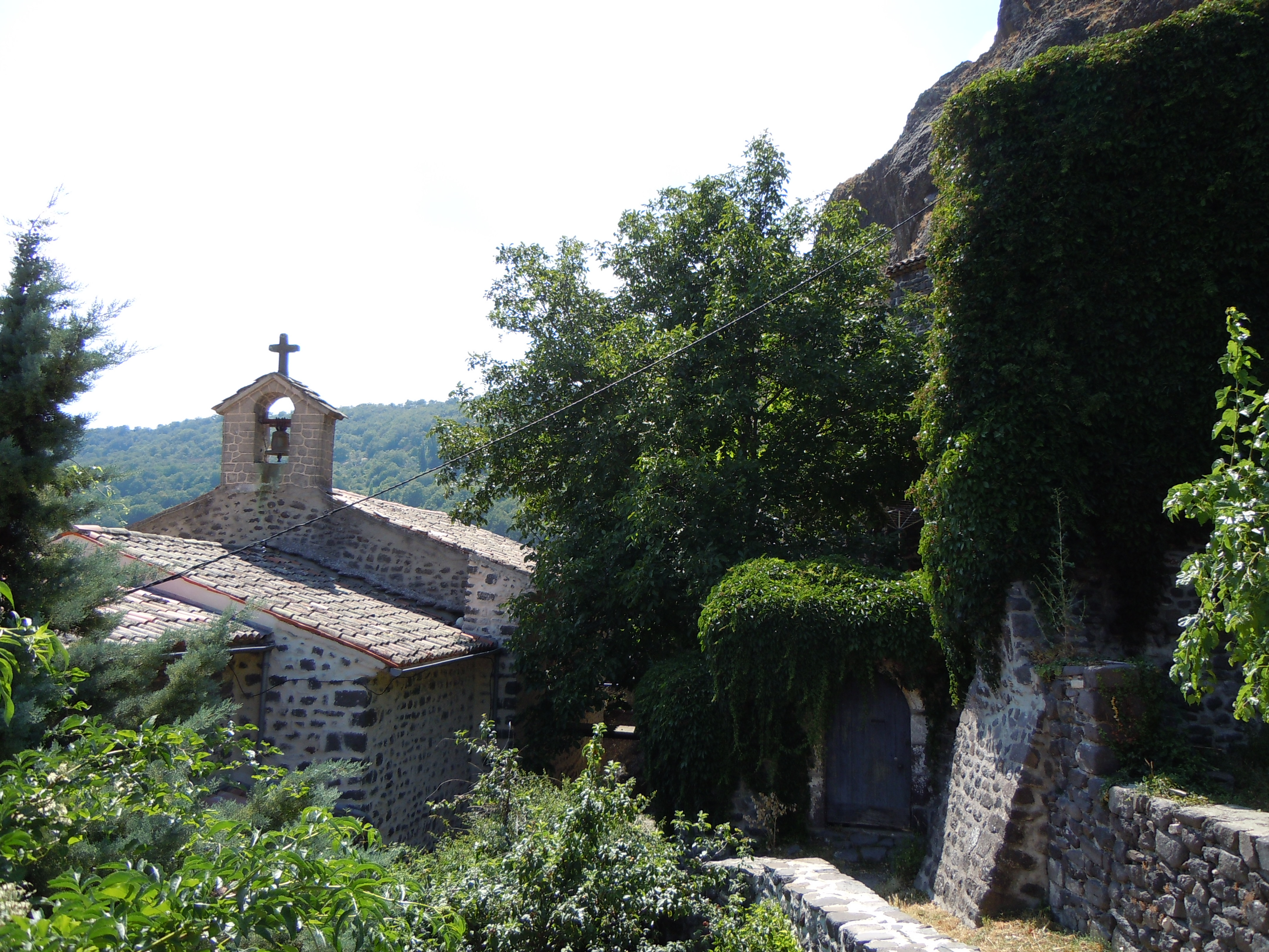 Sceautres (Ardèche) - Eglise